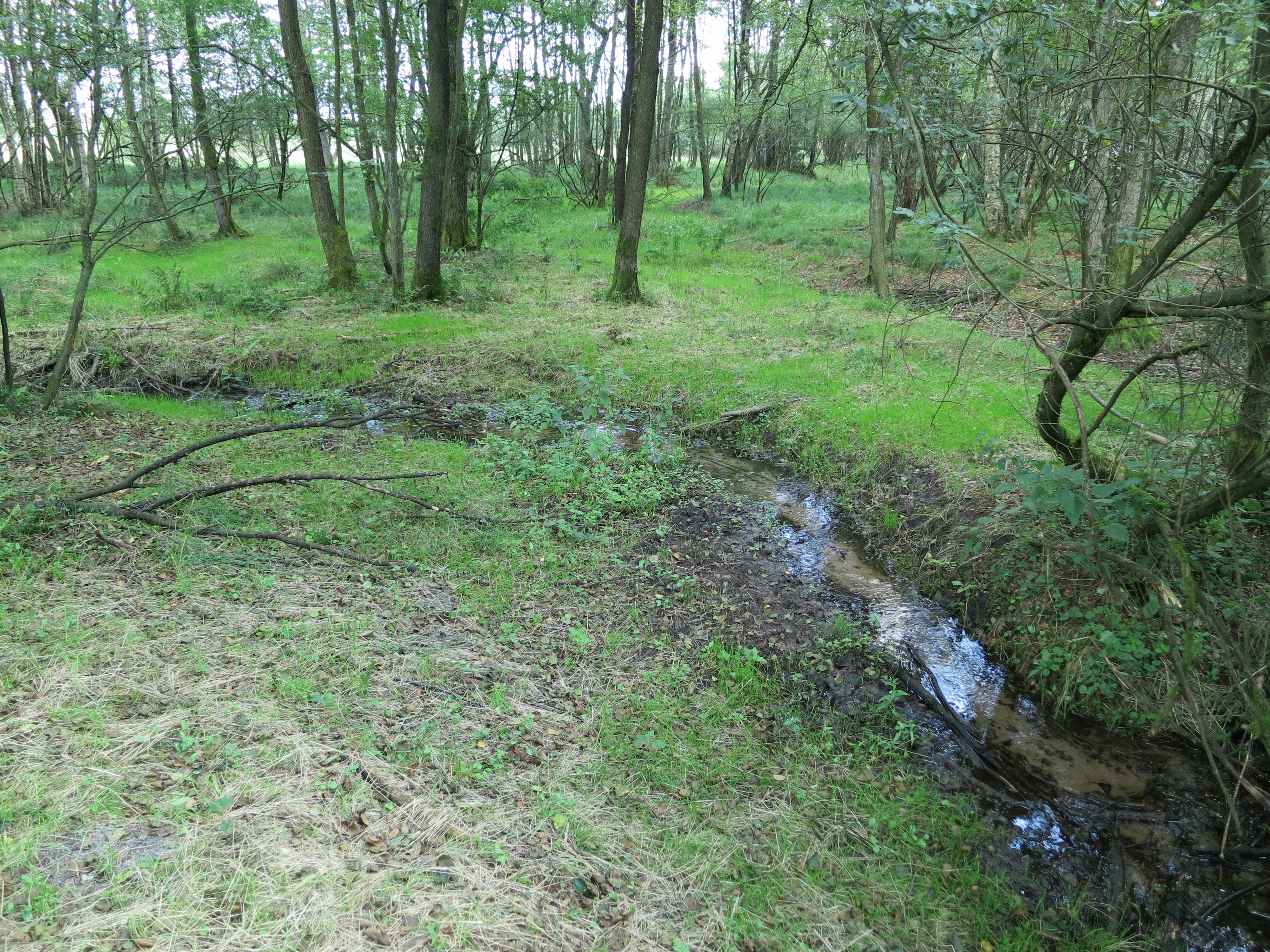 Die Haverbeeke (Vordergrund) am Zusammenfluss mit der Wümme (Hintergrund). Die Haverbeeke ist an diesem Punkt sowohl länger als auch wasserreicher als die Wümme (im Zeitpunkt des Fotos war die Wümme sogar ausgetrocknet, während die Haverbeeke noch Wasser führte); es mündet also eigentlich nicht die Haverbeeke in die Wümme, sondern umgekehrt die Wümme in die Haverbeeke bzw. die Haverbeeke ist der eigentliche Quellbach der Wümme.